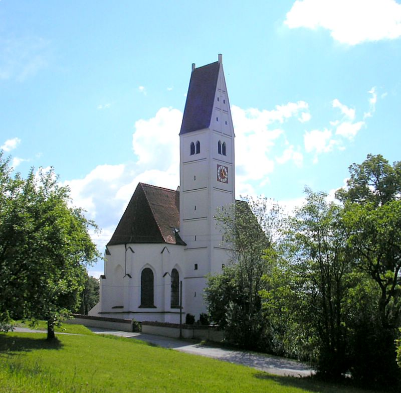 Pfarrkirche St. Wolfgang (Mickhausen, Landkreis Augsburg, Bayerisch-Schwaben). Gesamtansicht. Eigene Aufnahme, Mai 2007 / Parish church St. Wolfgang (Mickhausen, Bavaria, Germany. Total view. Own photo, May 2007